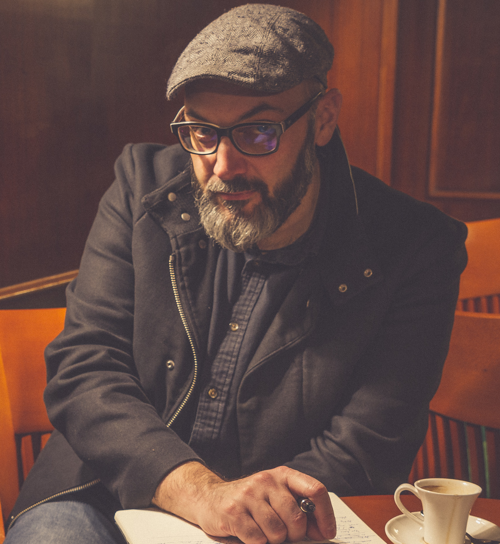 El escritor murciano Miguel Ángel Hernández